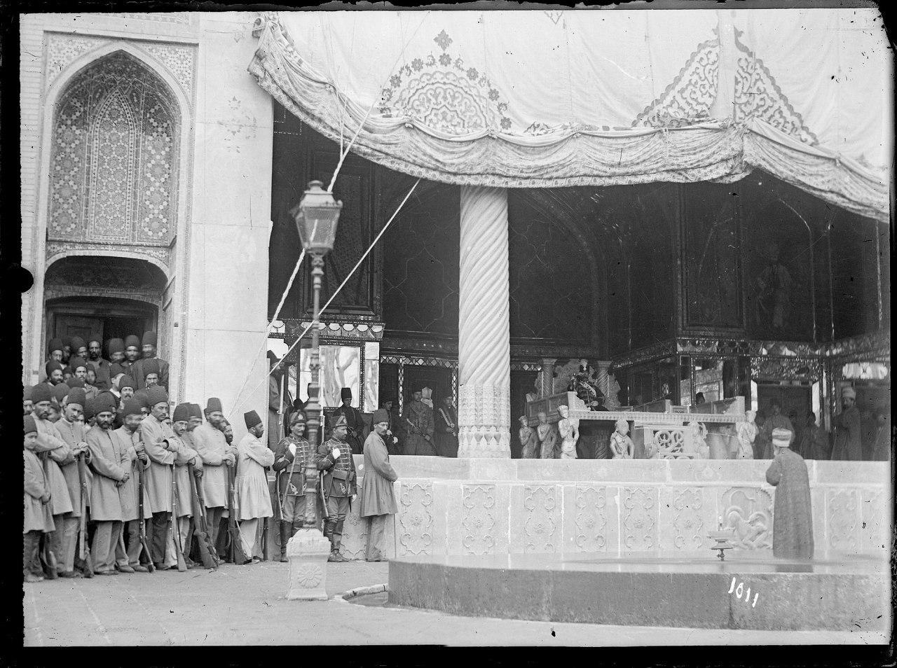 سلام اول فروردين ١٣١٠ ق (ناصرالدين شاه در تخت مرمر جلوس كرده)